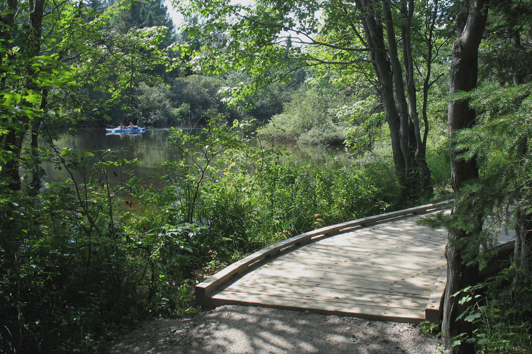 Parc linéaire des rivières Saint-Charles et du Berger. Secteur de Loretteville à Québec (Québec, Canada)